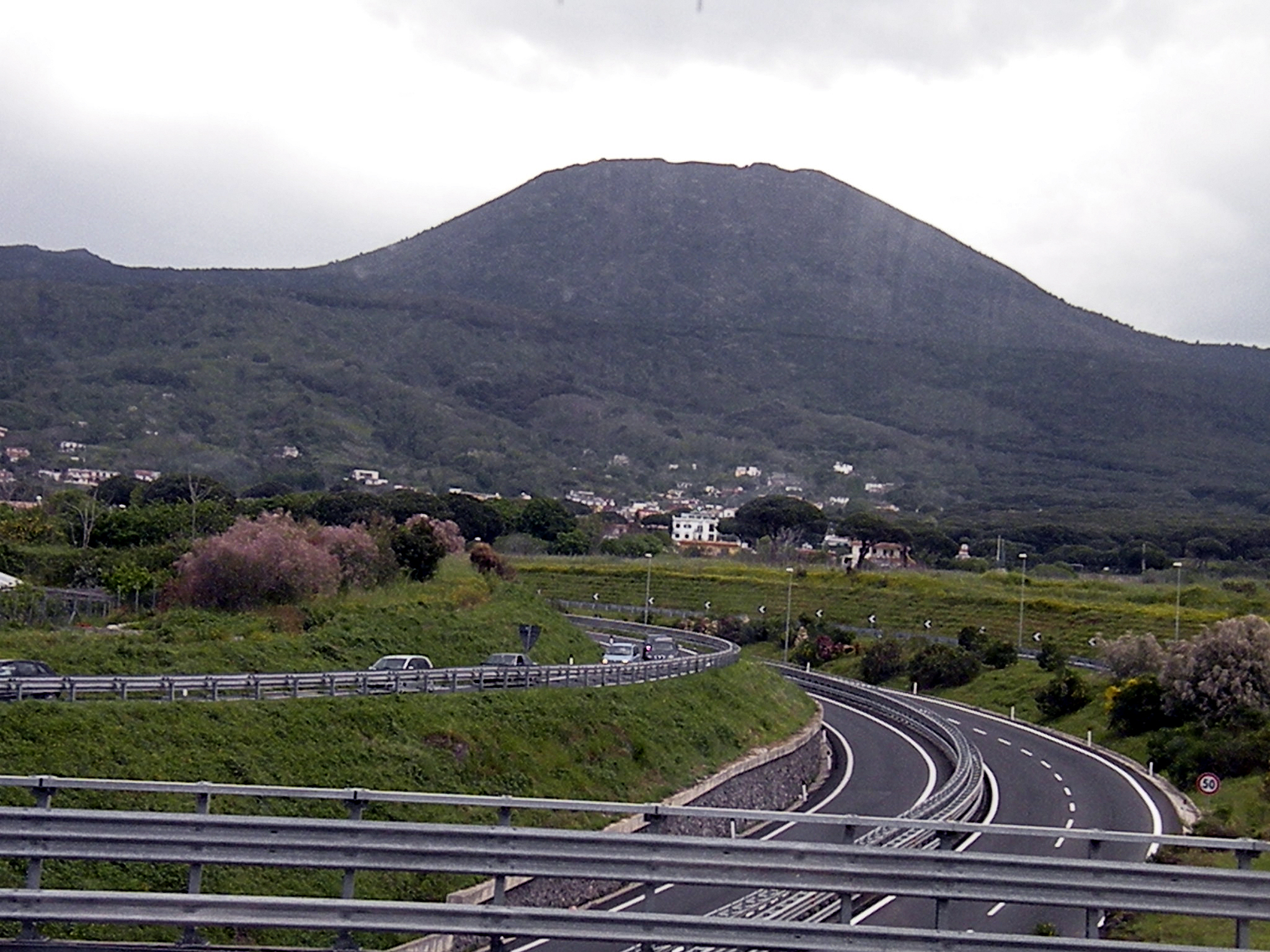 Везувий со стороны Эрколано (поселение на месте Геркуланума)